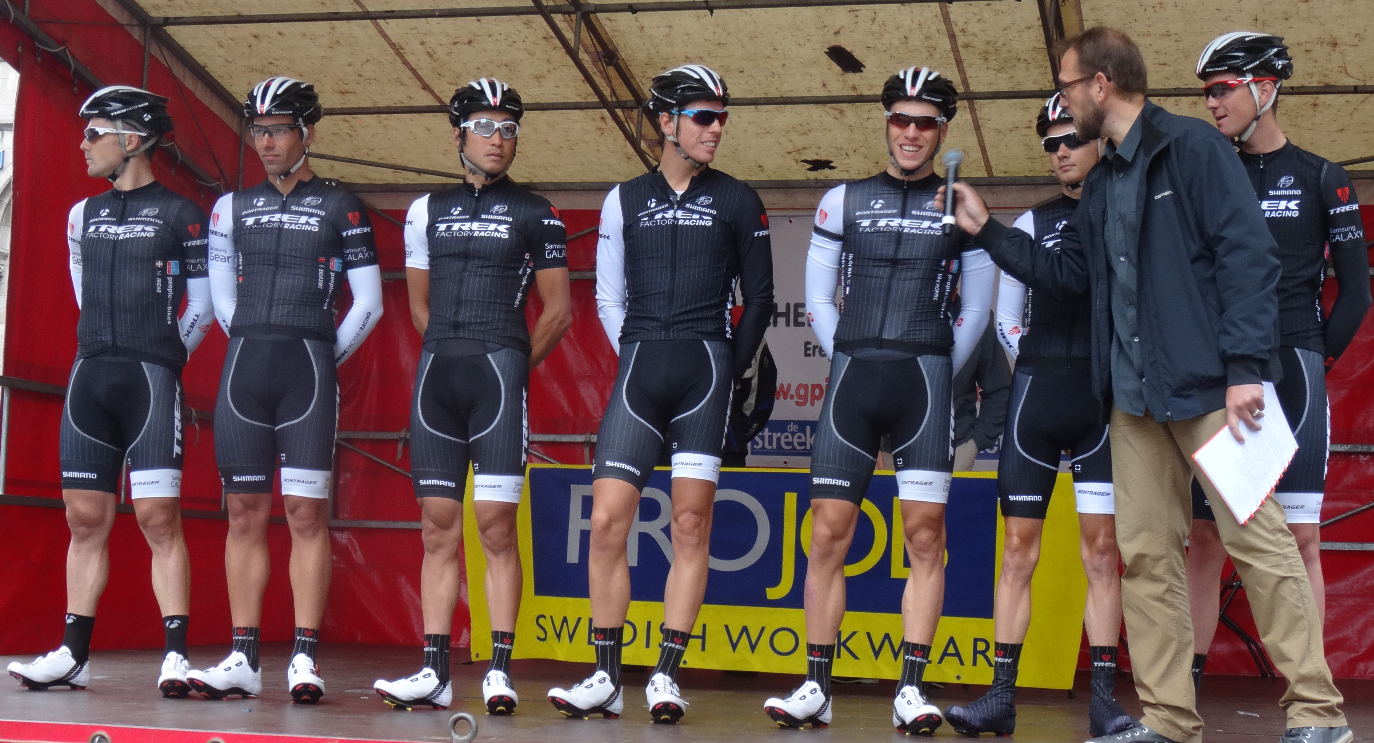 Reportage photographique réalisé le dimanche 14 septembre à l'occasion du départ et de l'arrivée du Grand Prix Jef Scherens 2014 à Louvain, Belgique.